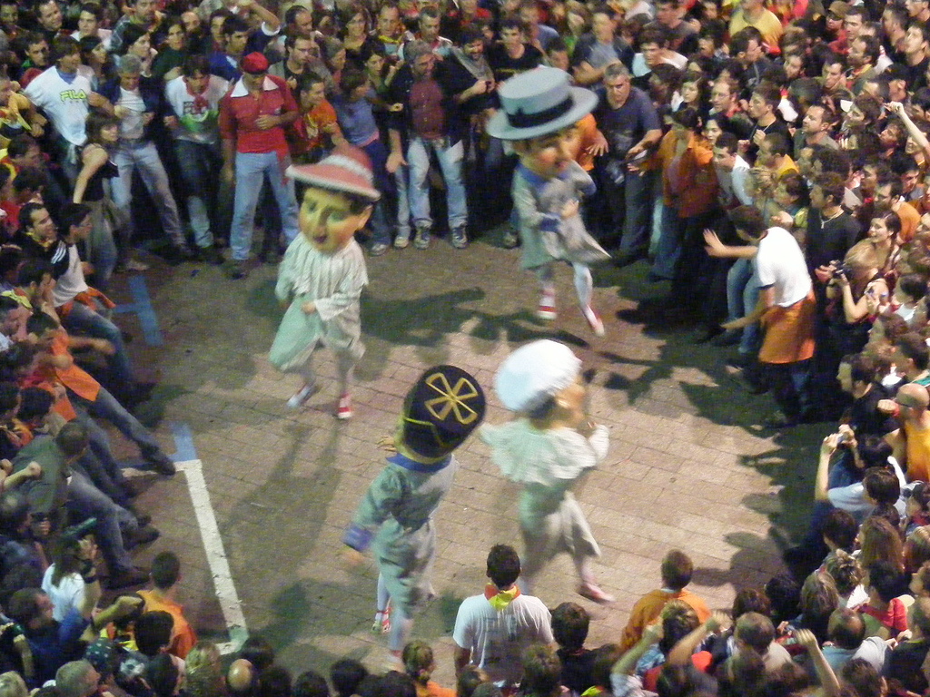 2n Salt - Nans Nous, 2009